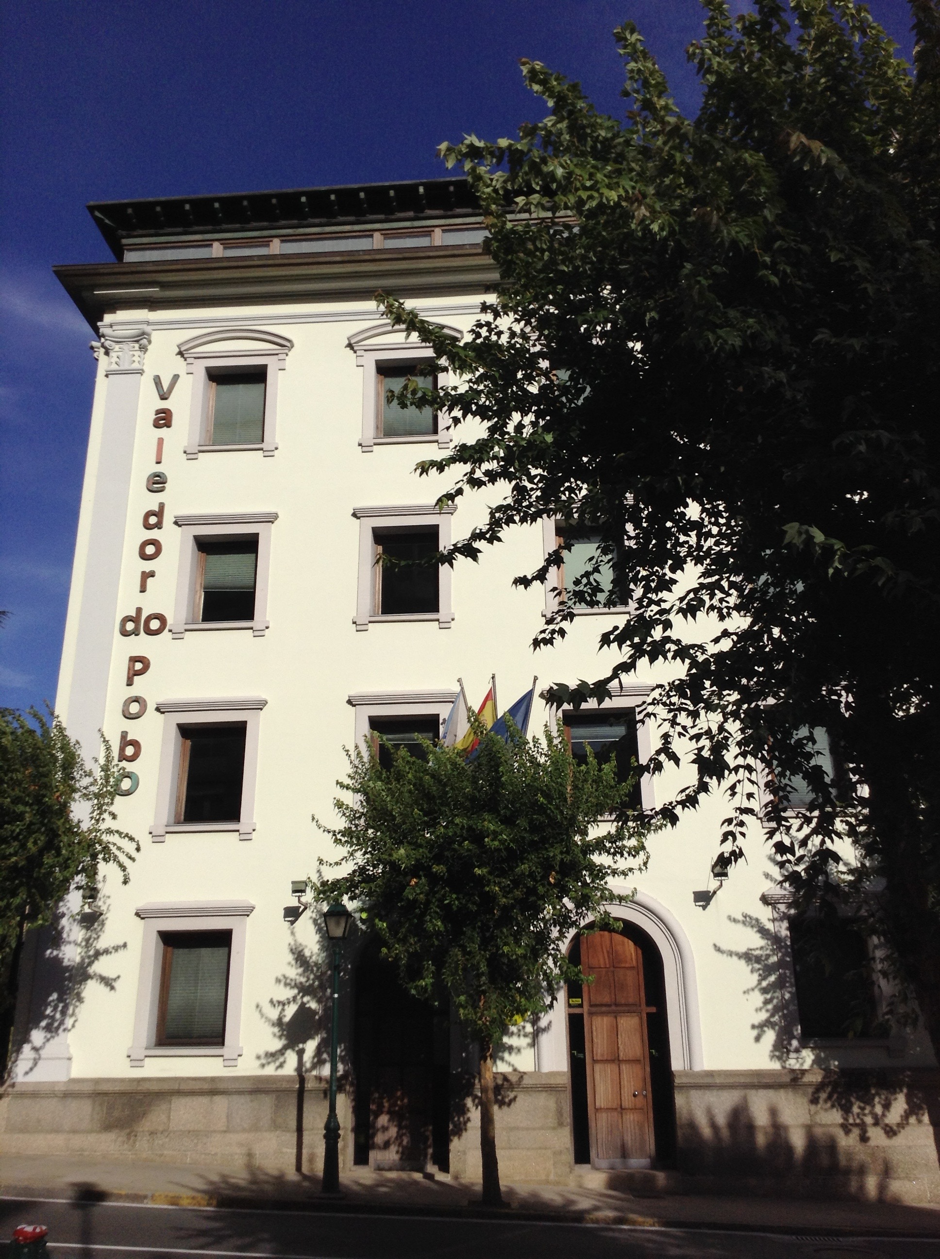 Sede do Valedor do Pobo (Santiago de Compostela)